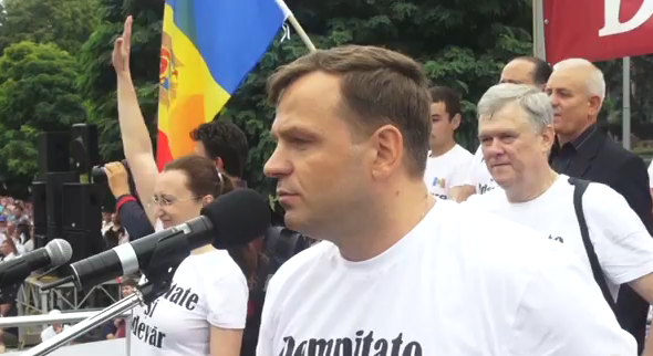 Andrei Năstase